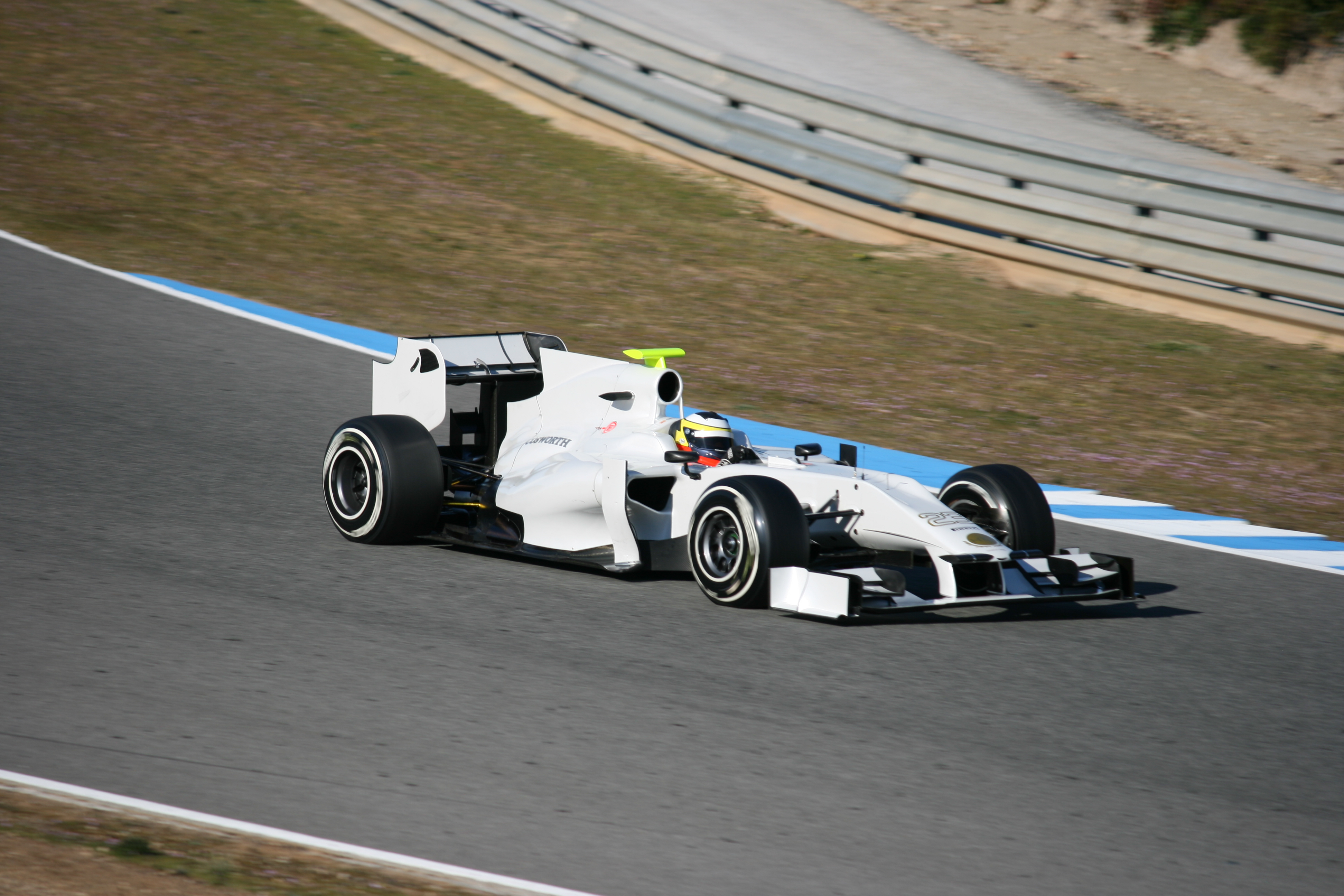 HRT F111